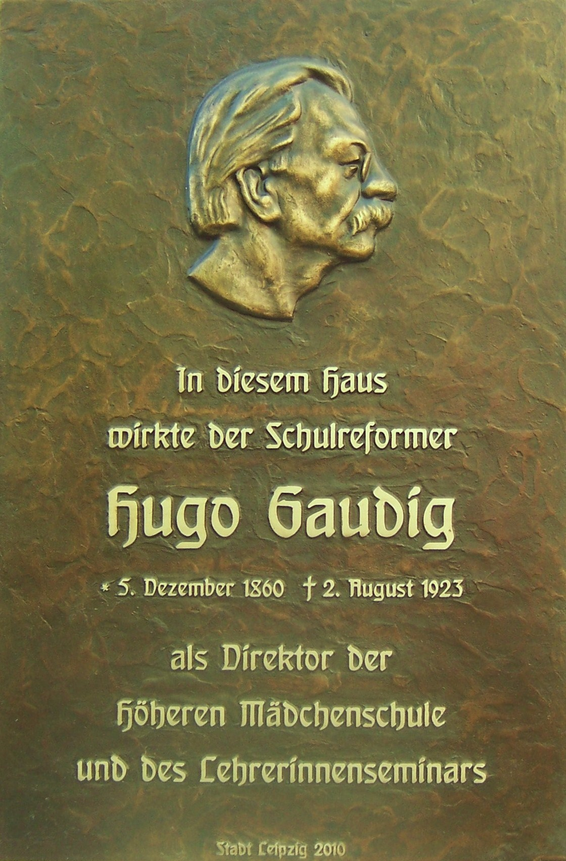 Gedenktafel der Stadt Leipzig für Hugo Gaudig in der Riemannstraße am Evangelische Schulzentrum